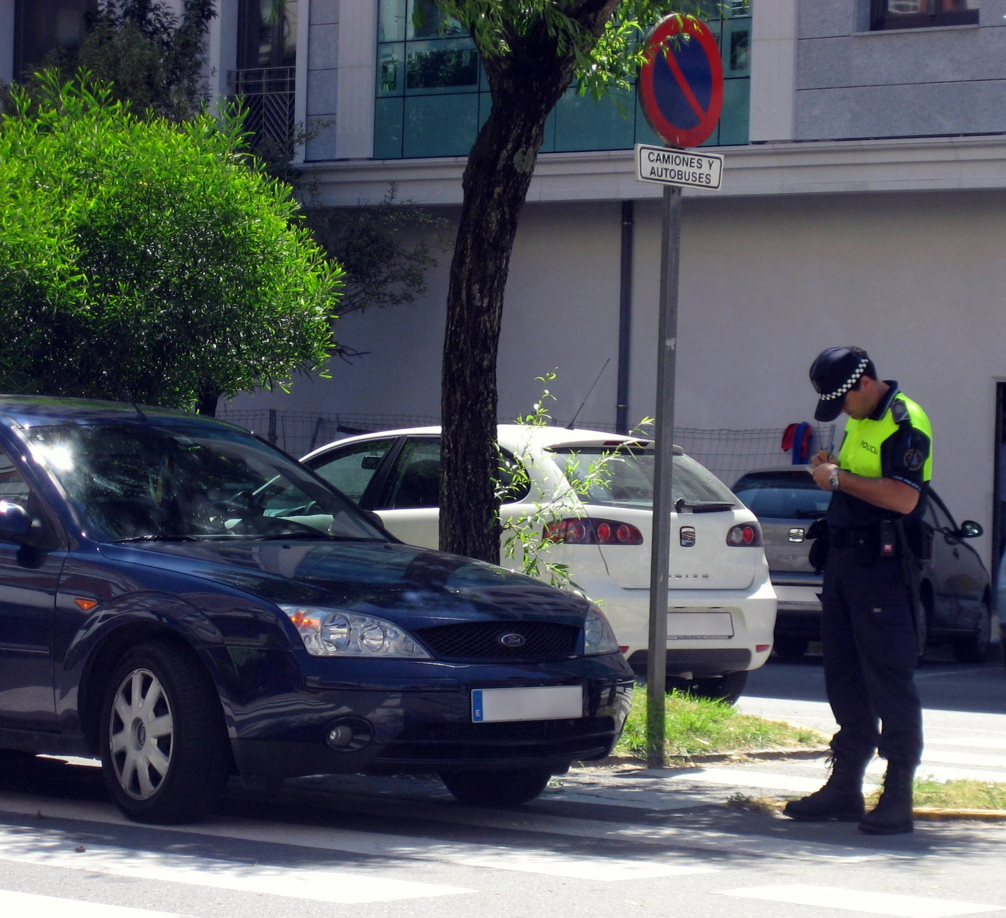 Un policía español poniendo una multa por mal aparcamiento, en Boiro (Galicia, España).